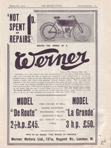 Werner 1904, advertisement